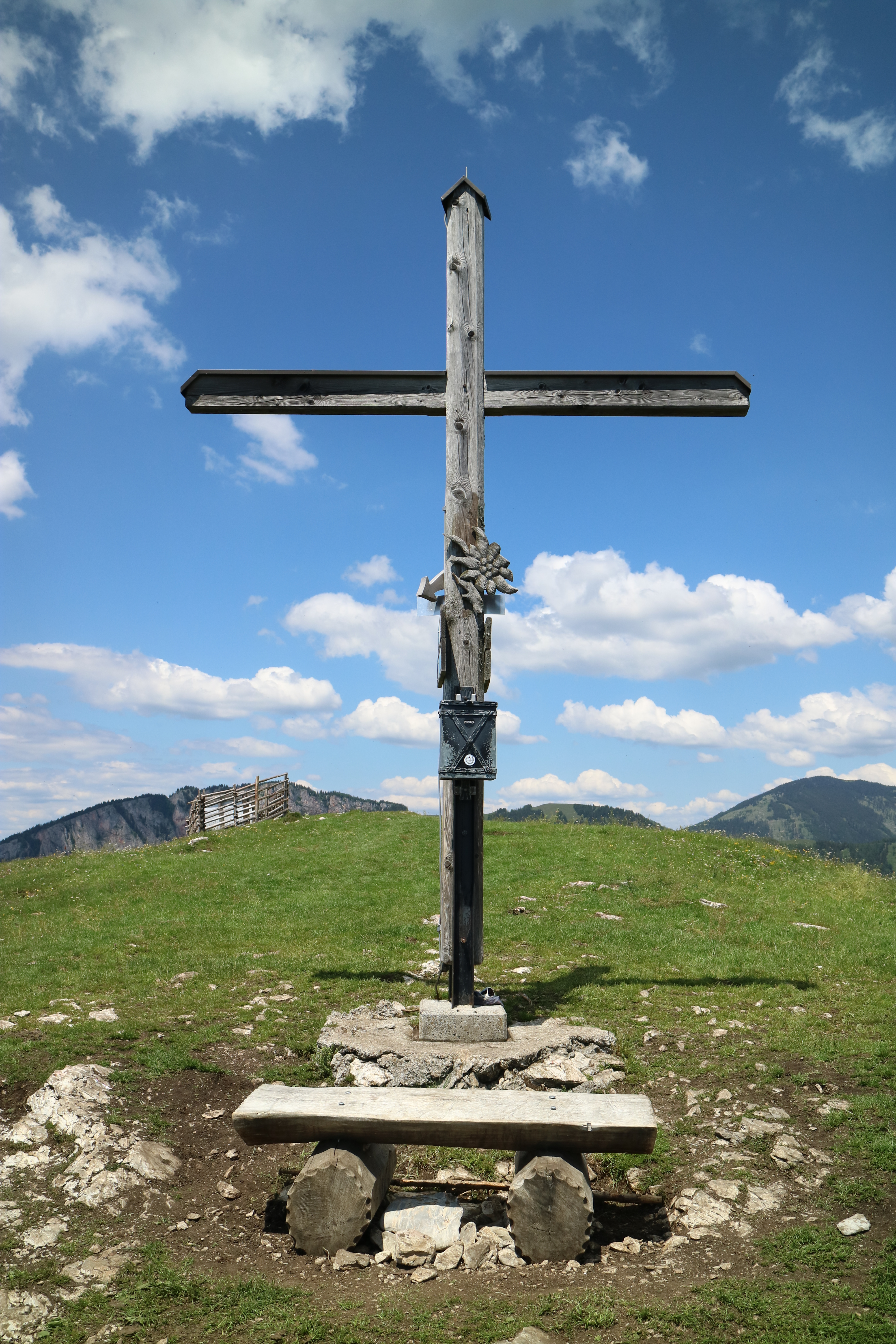 Gipfelkreuz auf dem Gschaidberg, Grazer Bergland, Steiermark